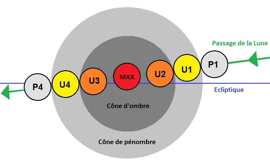 Diagramme présentant le fonctionnement d'une éclipse solaire ainsi que les références des temps clés.